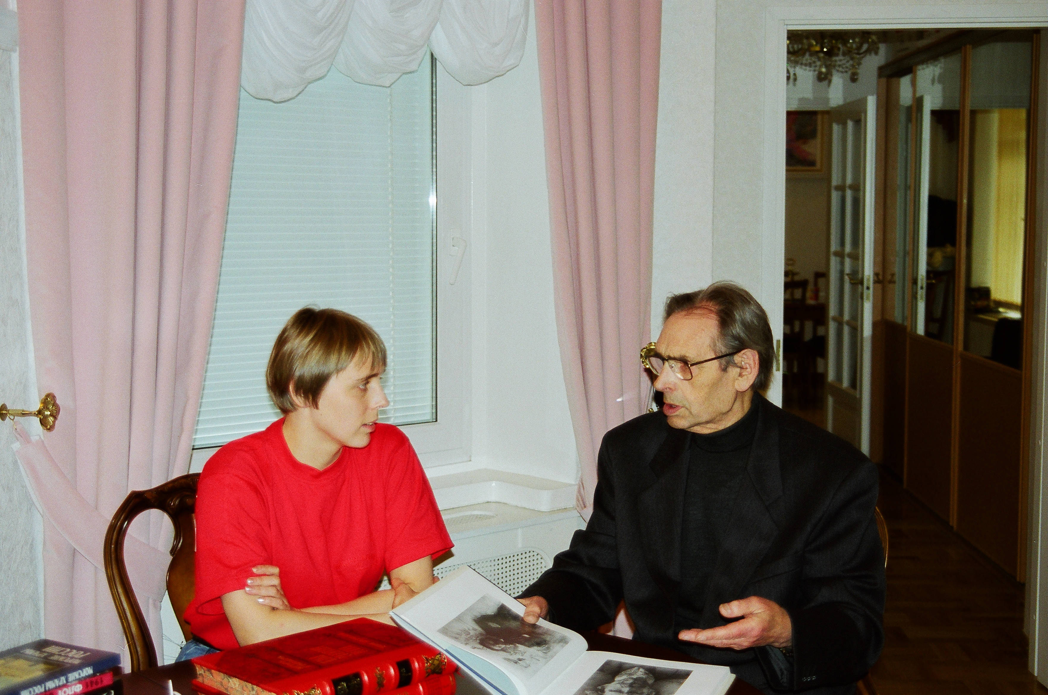 Лев Константинович Богомолец возле картины "Маки" в квартире Марины Николаевны Колотило. Слева - Марина Колотило